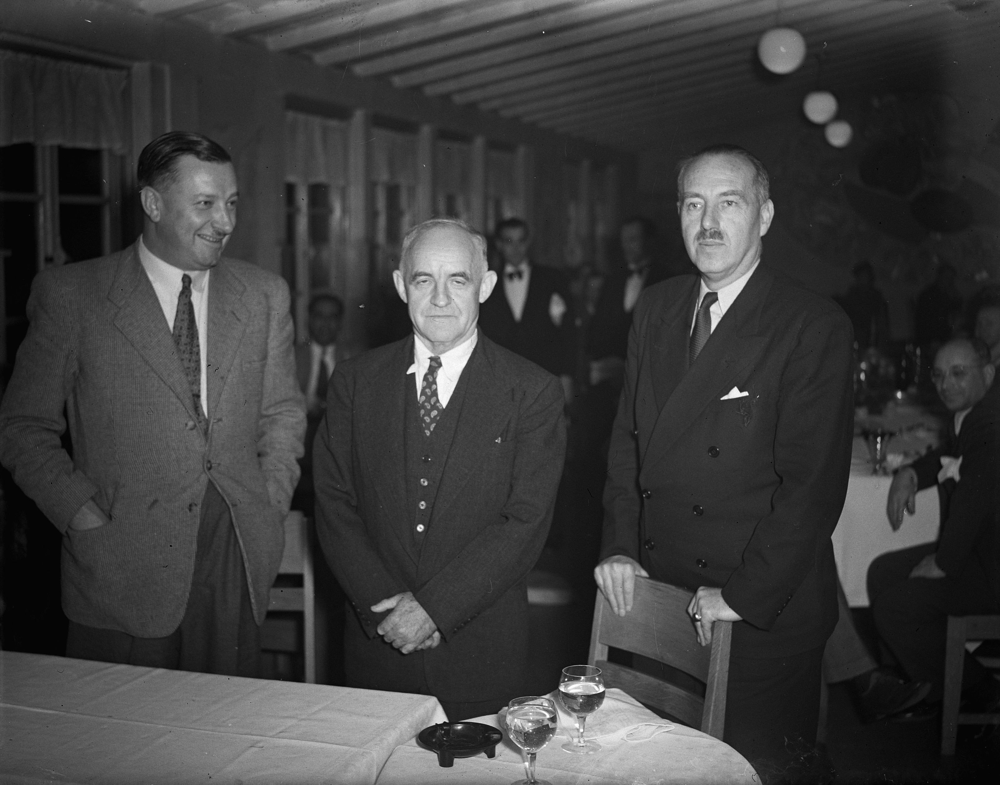 Collectie / Archief : Fotocollectie Anefo Reportage / Serie : [ onbekend ] Beschrijving : Commissie van Drie op Schiphol Annotatie : Betreft de Commissie van Goede Diensten van de Verenigde Naties, bestaande uit de Amerikaan Frank P Graham (midden) , de Australiër Richard Kirby (links) en de Belg Paul van Zeeland (rechts) Datum : 31 januari 1948 Locatie : Noord-Holland, Schiphol Persoonsnaam : Graham, Frank P., Kirby, Richard, Zeeland, Paul Fotograaf : Noske, J.D. / Anefo Auteursrechthebbende : Nationaal Archief Materiaalsoort : Glasnegatief Nummer archiefinventaris : bekijk toegang 2.24.01.09 Bestanddeelnummer : 902-5630